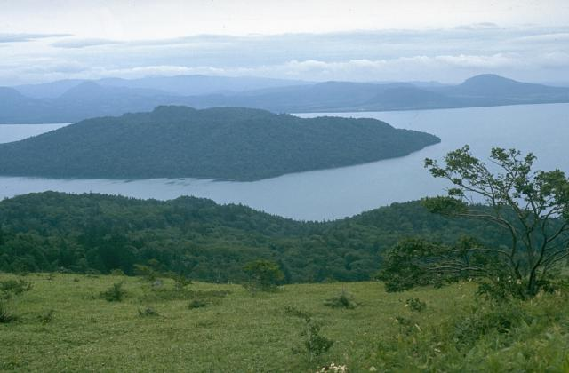 Kussharo caldera in Hokkaido.